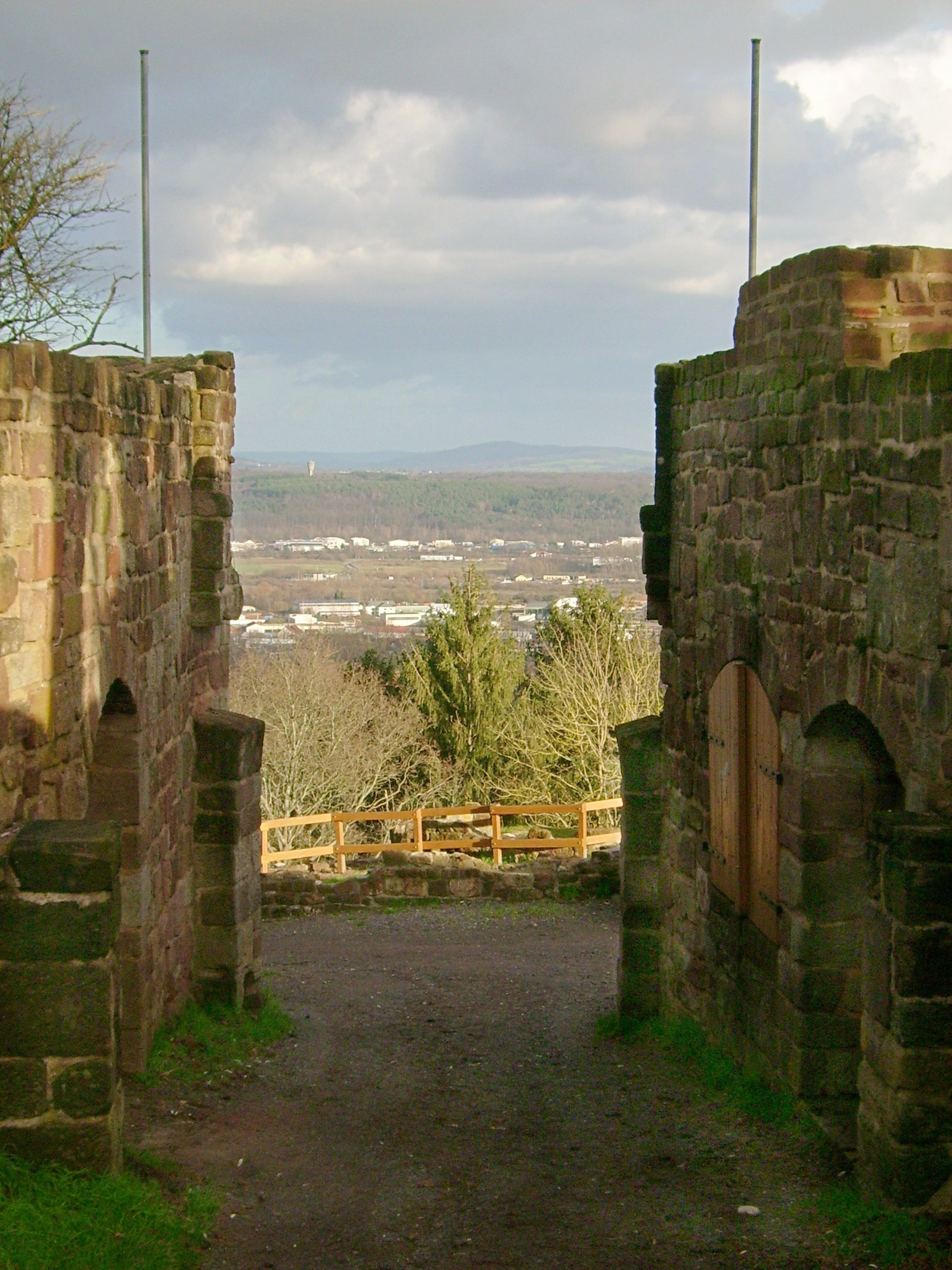 Siersburg Tor